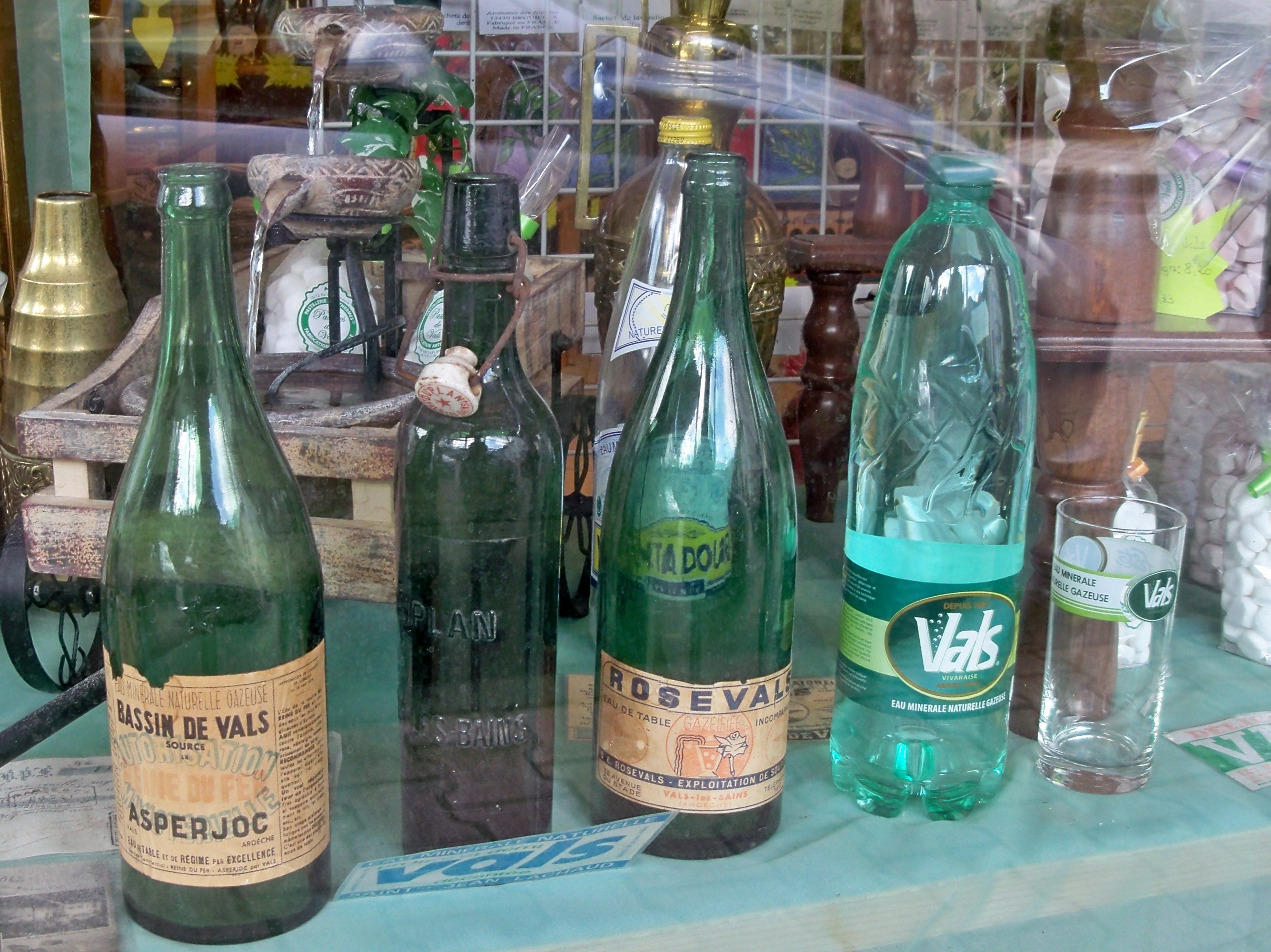 anciennes bouteilles d'eau de µVals